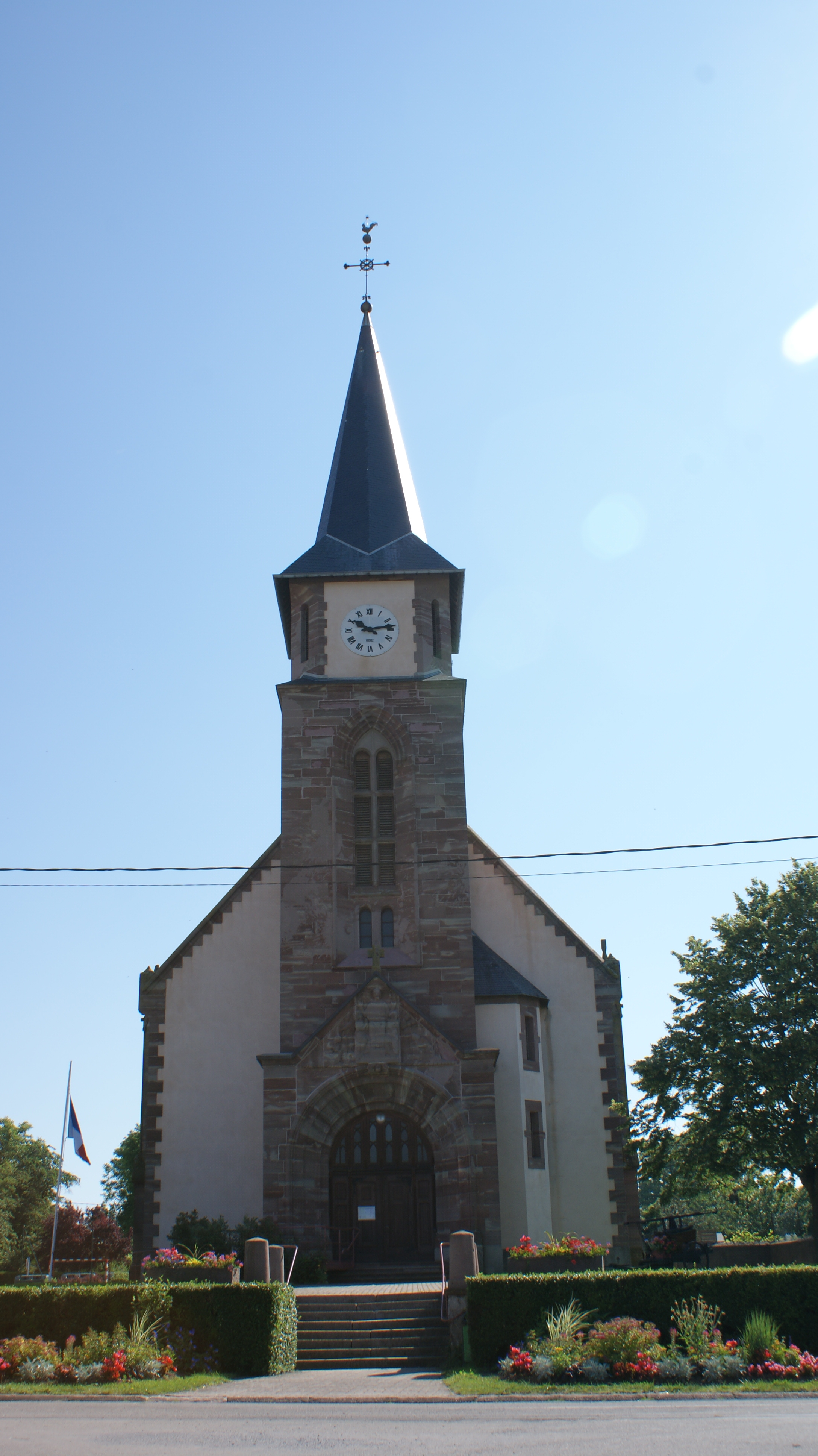 eglise au centre d'Ancerville